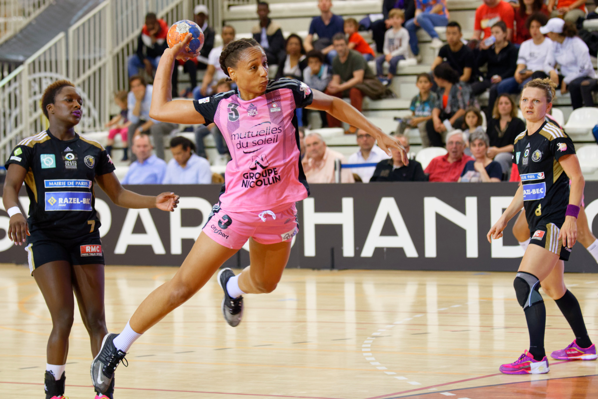 Rencontre de playoff pour la place 3 et 4 entre Issy Paris Hand et Nice. A Issy Les Moulineaux, le 28 mai 2016.